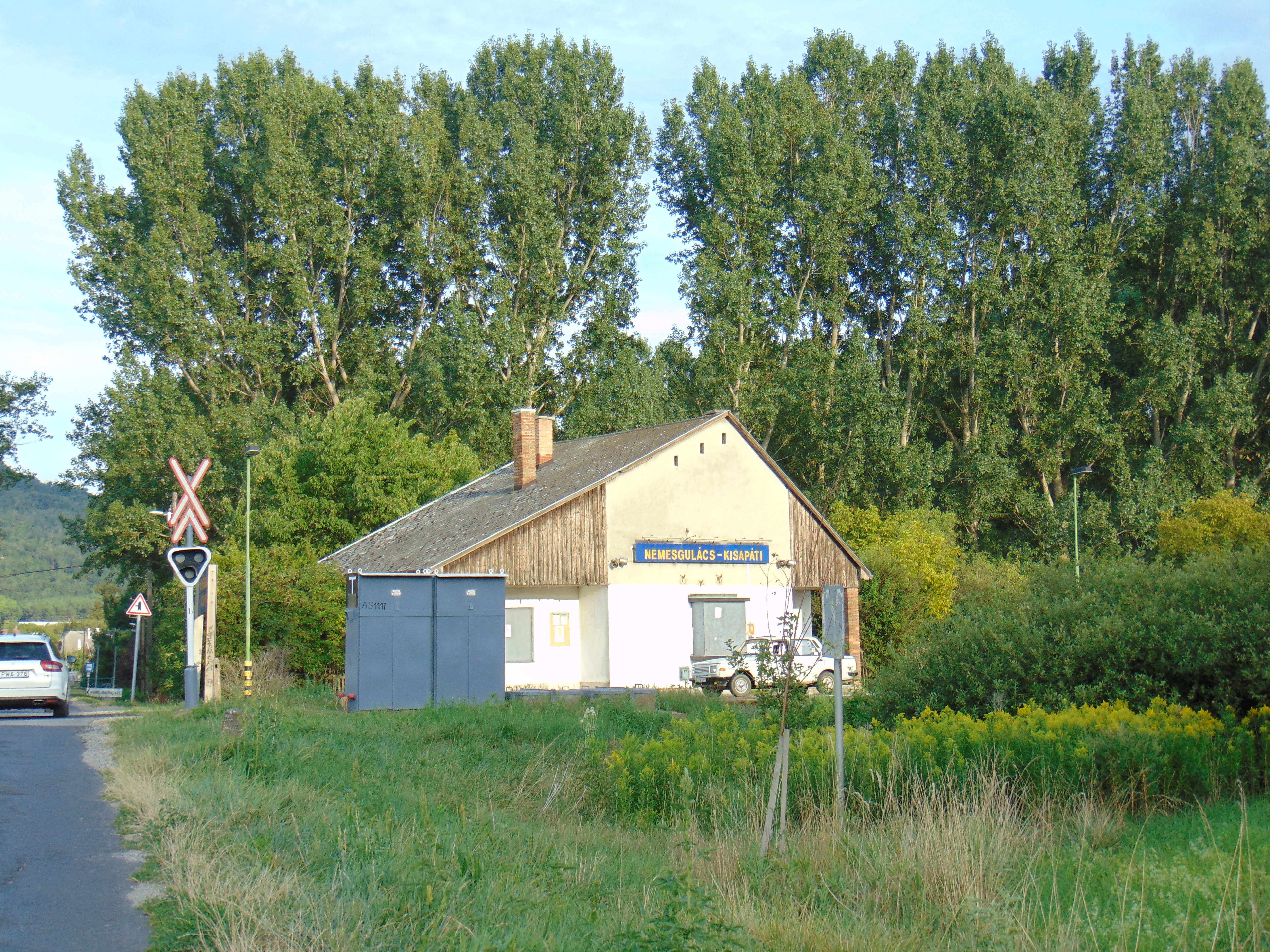 A tapolcai vasútvonal Nemesgulács-Kisapáti megállóhelye, a 7345-ös út fénysorompós keresztezésével, Kisapáti felől nézve